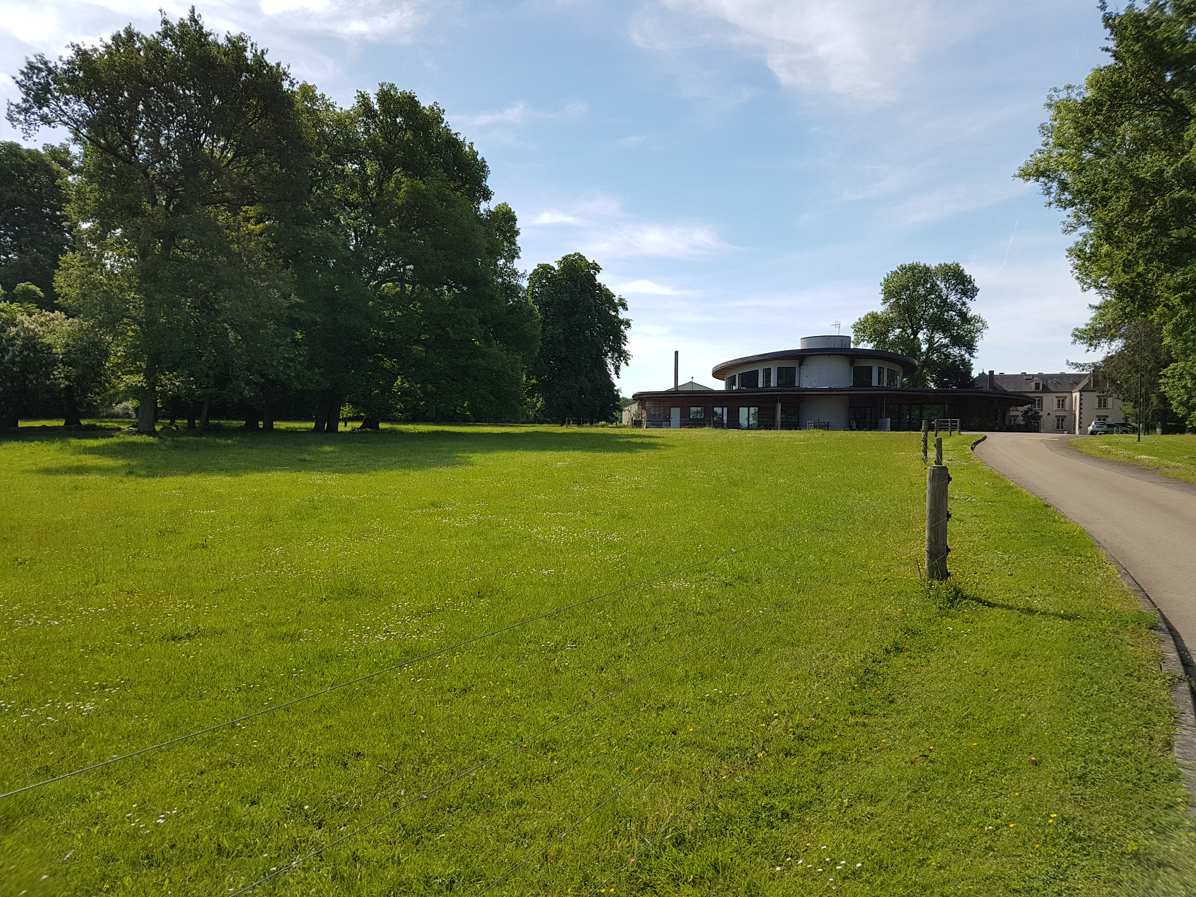 Centre d'application de Champignelles Ecole nationale vétérinaire d'Alfort